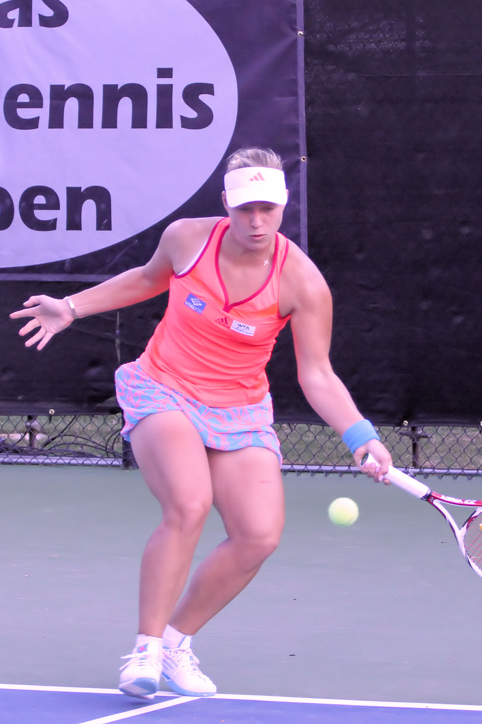 Angelique Kerber (GER); 2011-08-24 Oudin vs Kerber